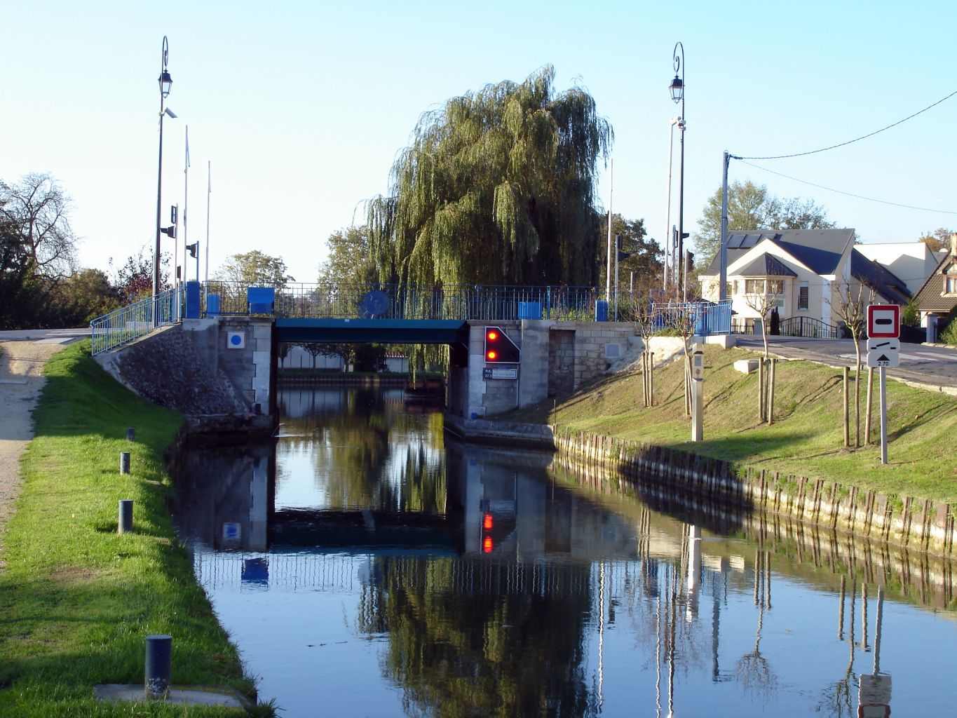 Le canal de l'Ourcq à Claye-Souilly (France) - Novembre 2006 Photo personnelle de clicsouris